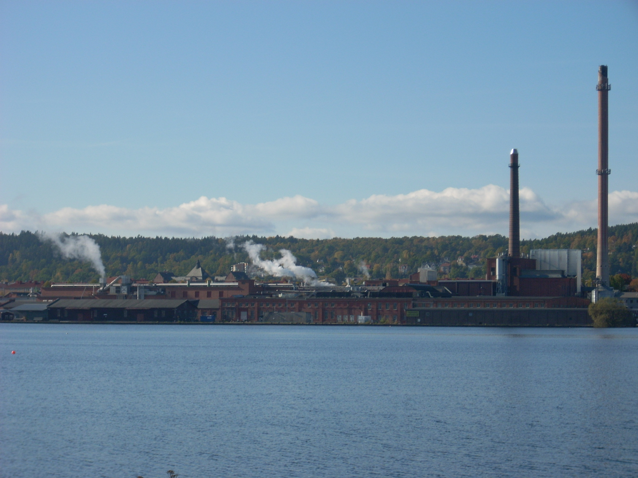 Munksjö papperbruk med Munksjön i förgrunden